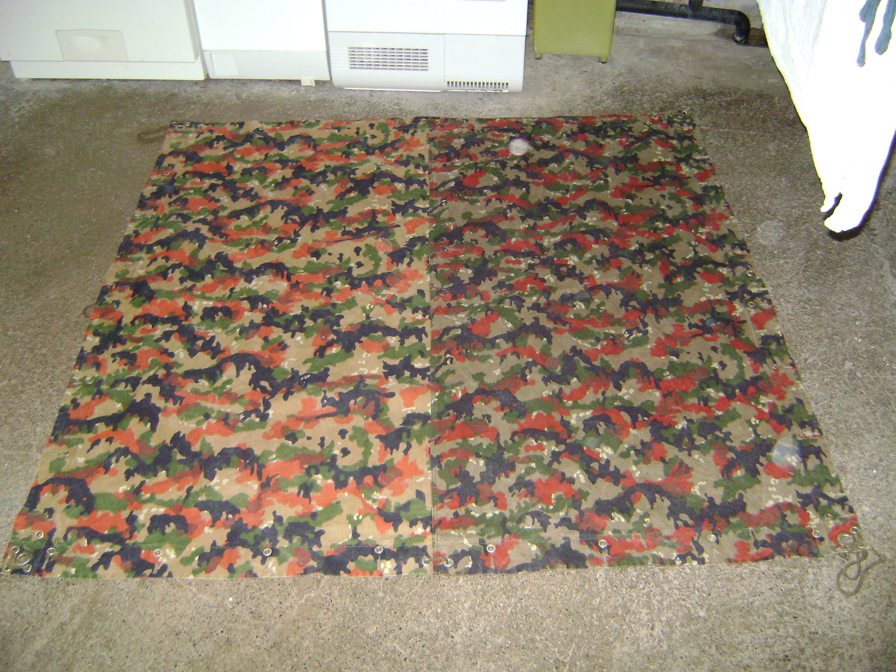 Blache Front